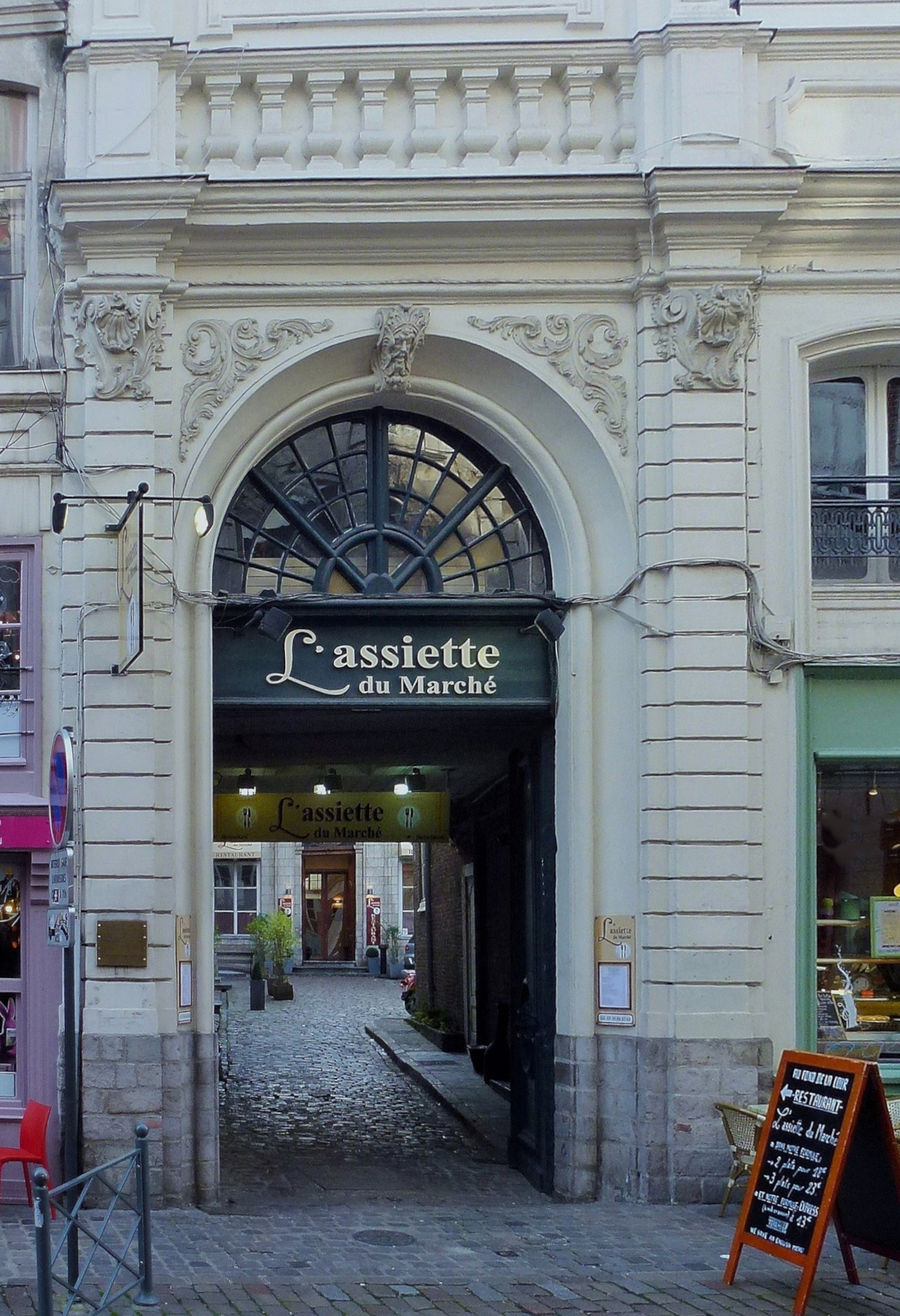 Rue de la Monnaie (Lille) à Lille Nord (département français)